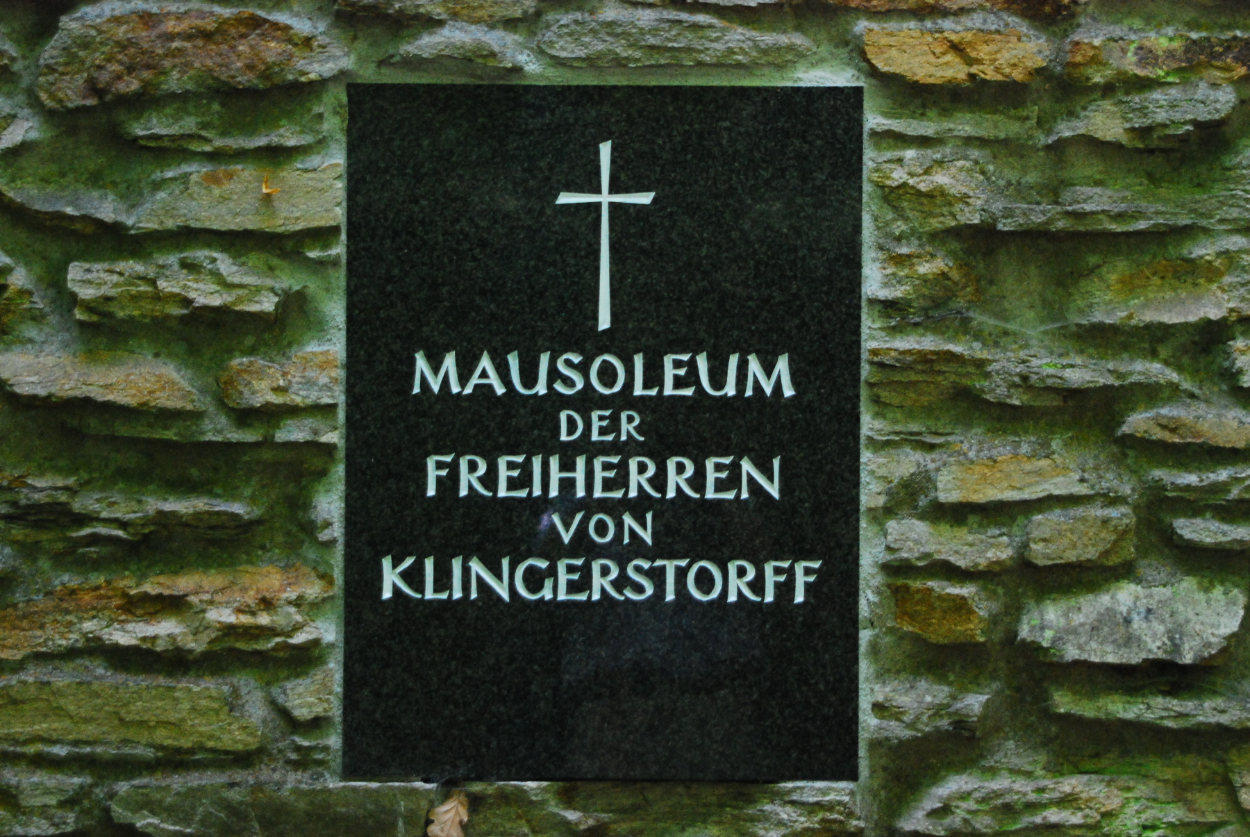 Mausoleum der Freiherren von Klingertorff bei Raabs an der Thaya